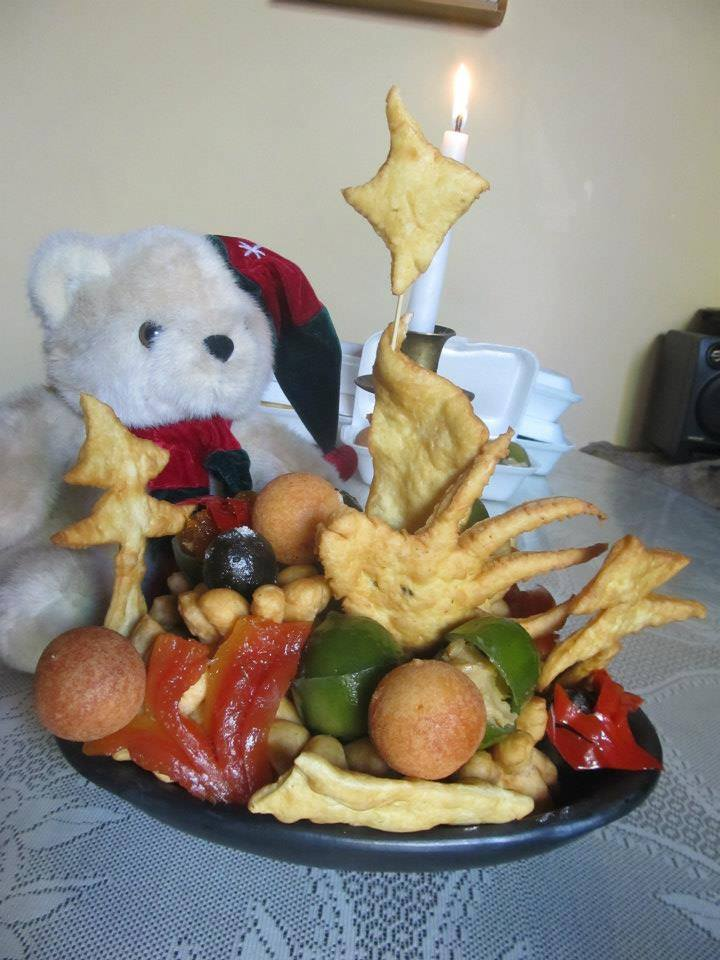 Dulces y panes navideños